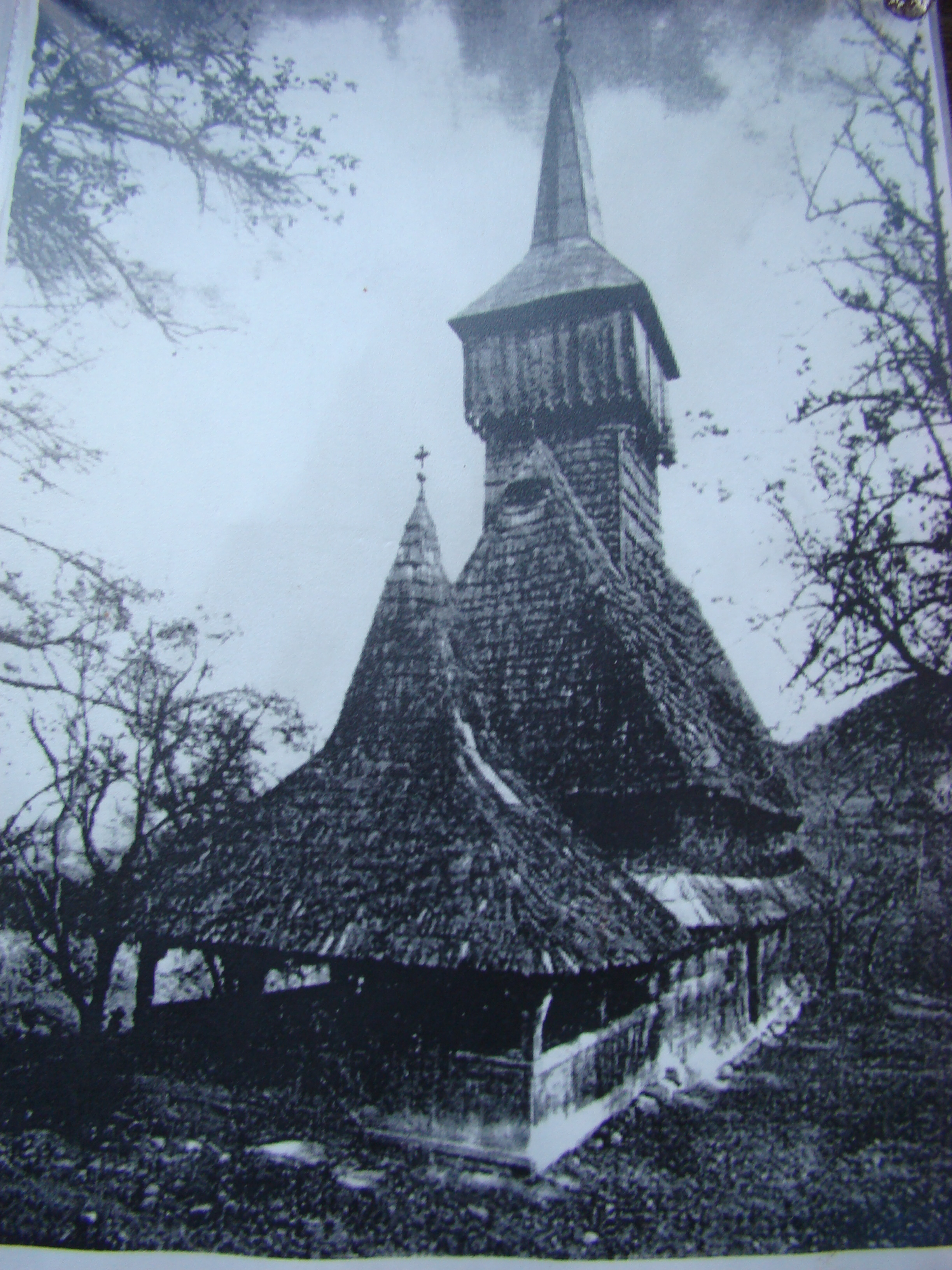 Biserica de lemn „Sfinții Arhangheli” din Văleni, județul Maramureș (în forma sa originală, refotografiere după o poză din arhiva parohiei)